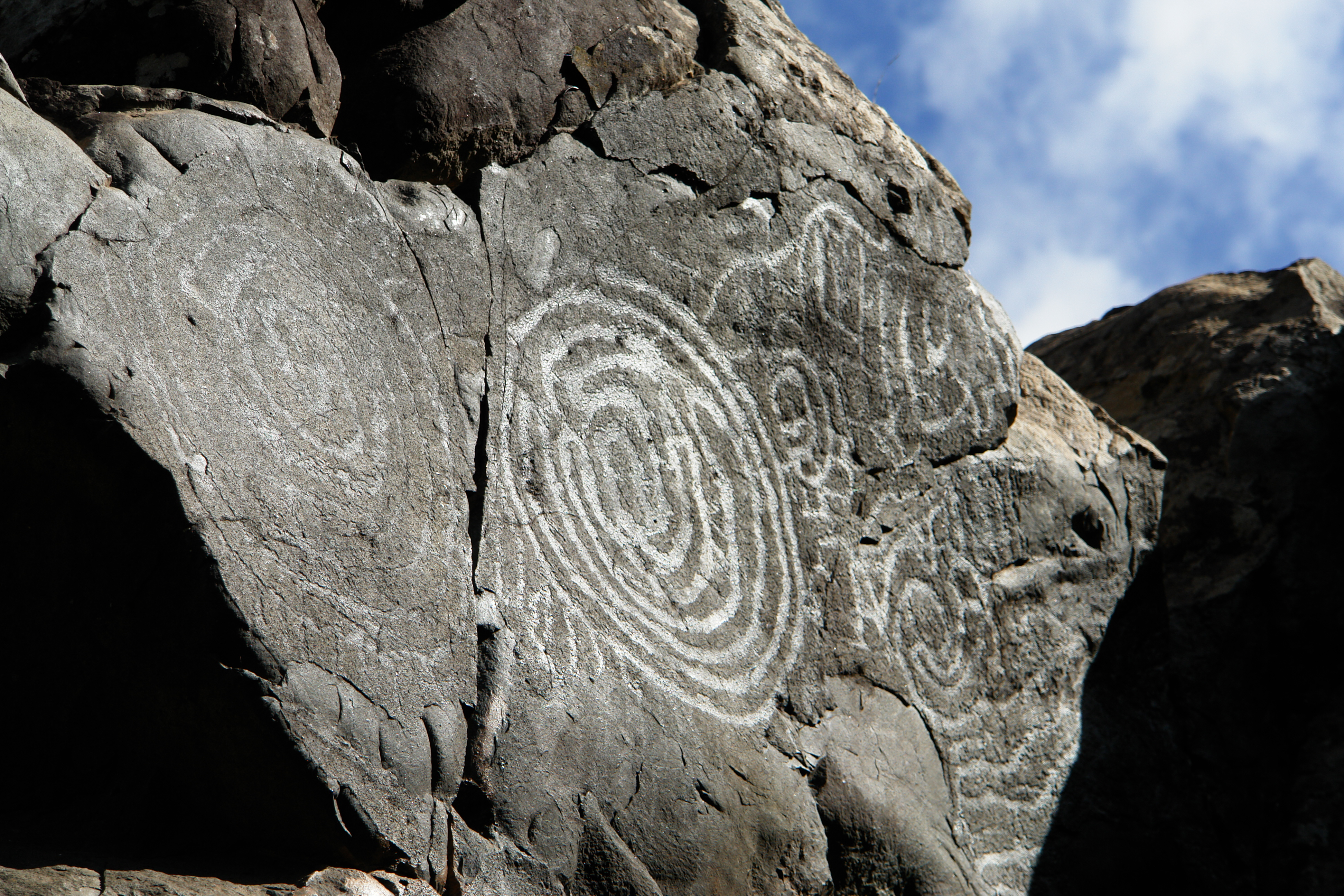 Petroglyphen von El Cementerio auf der Spanischen Insel La Palma